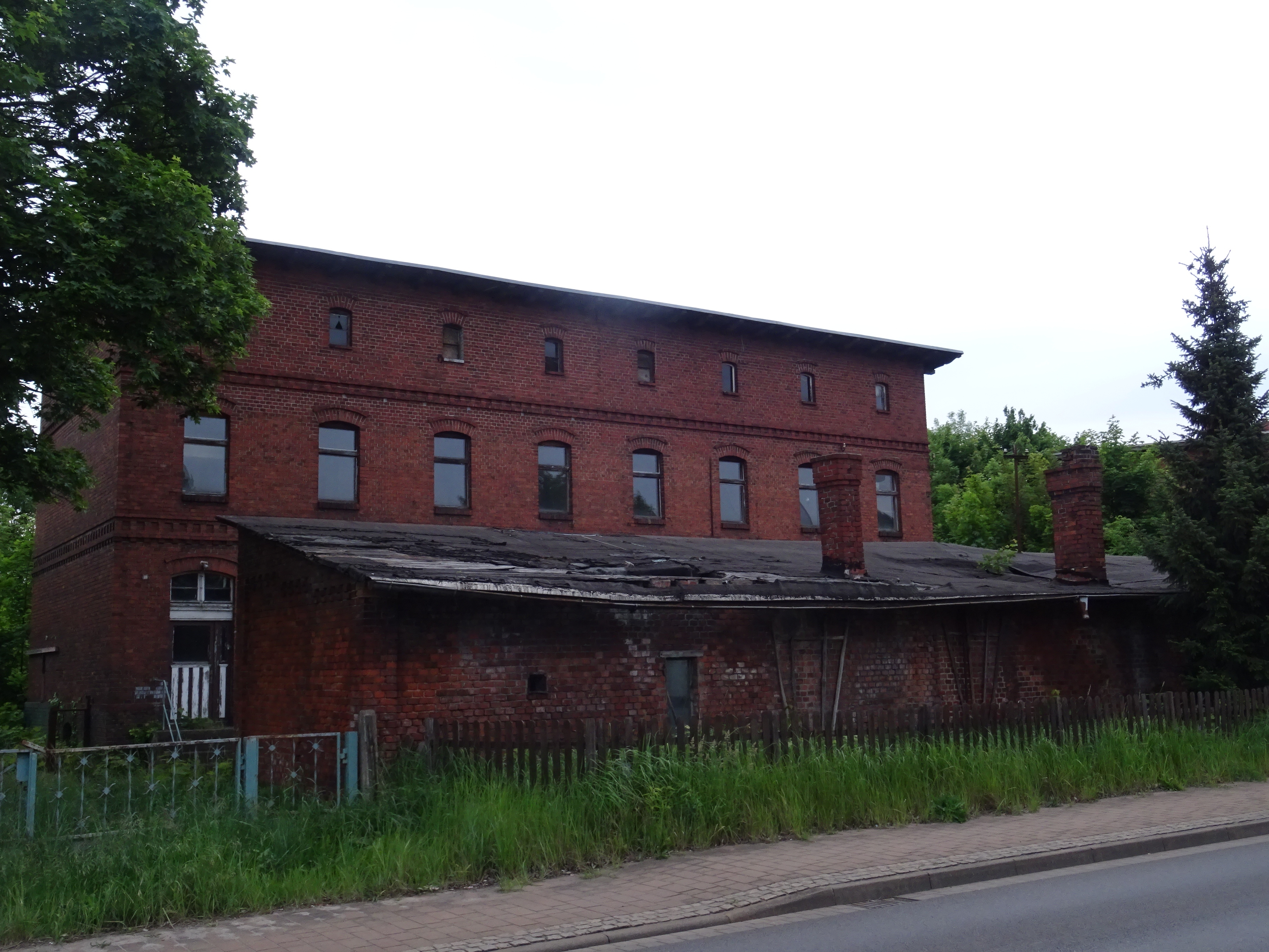 Früherer Bahnhof Ueckermünde, denkmalgeschütztes EIsenbahnerwohnhaus